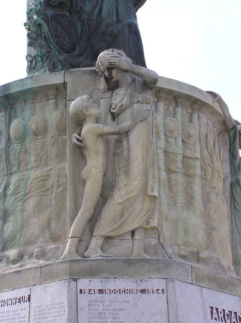 Arcachon en Gironde monument aux morts réalisé en 1924.